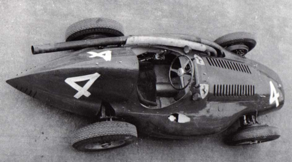 La Ferrari 553 F2 durante i primi test effettuati a Monza nel 1954.